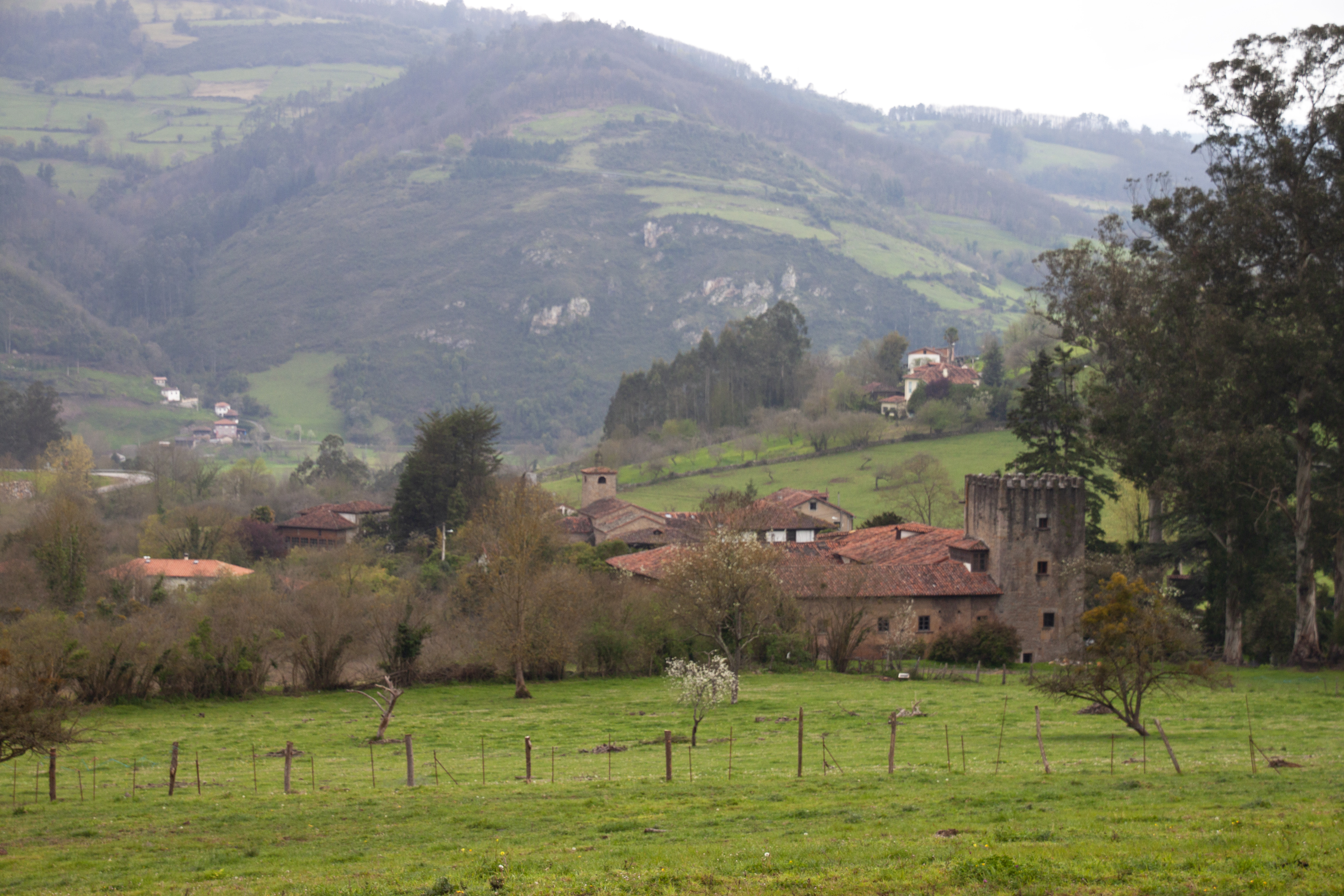 Santa Eulalia de las Dorigas (Salas, Asturias)